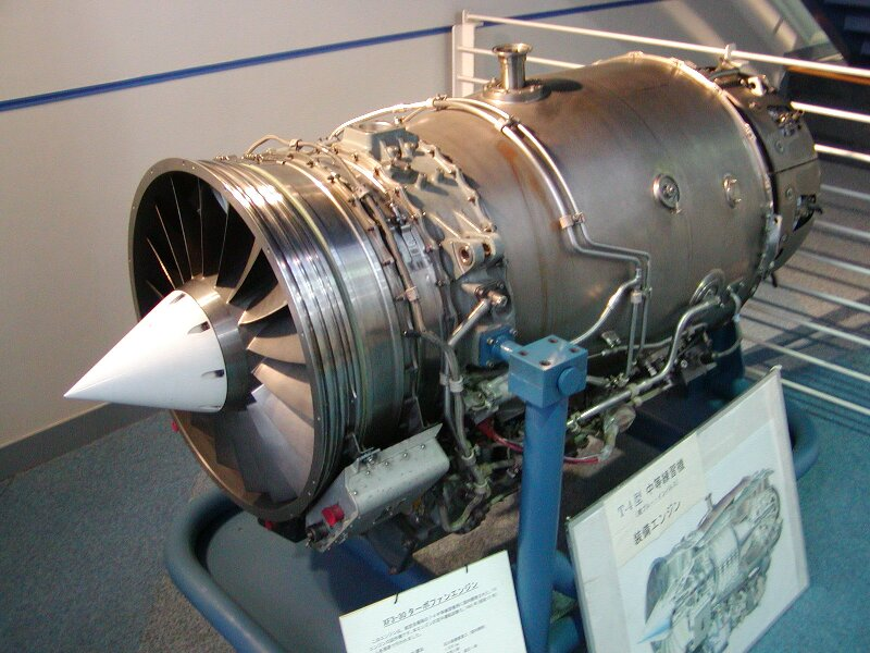 展示されるXF3エンジン